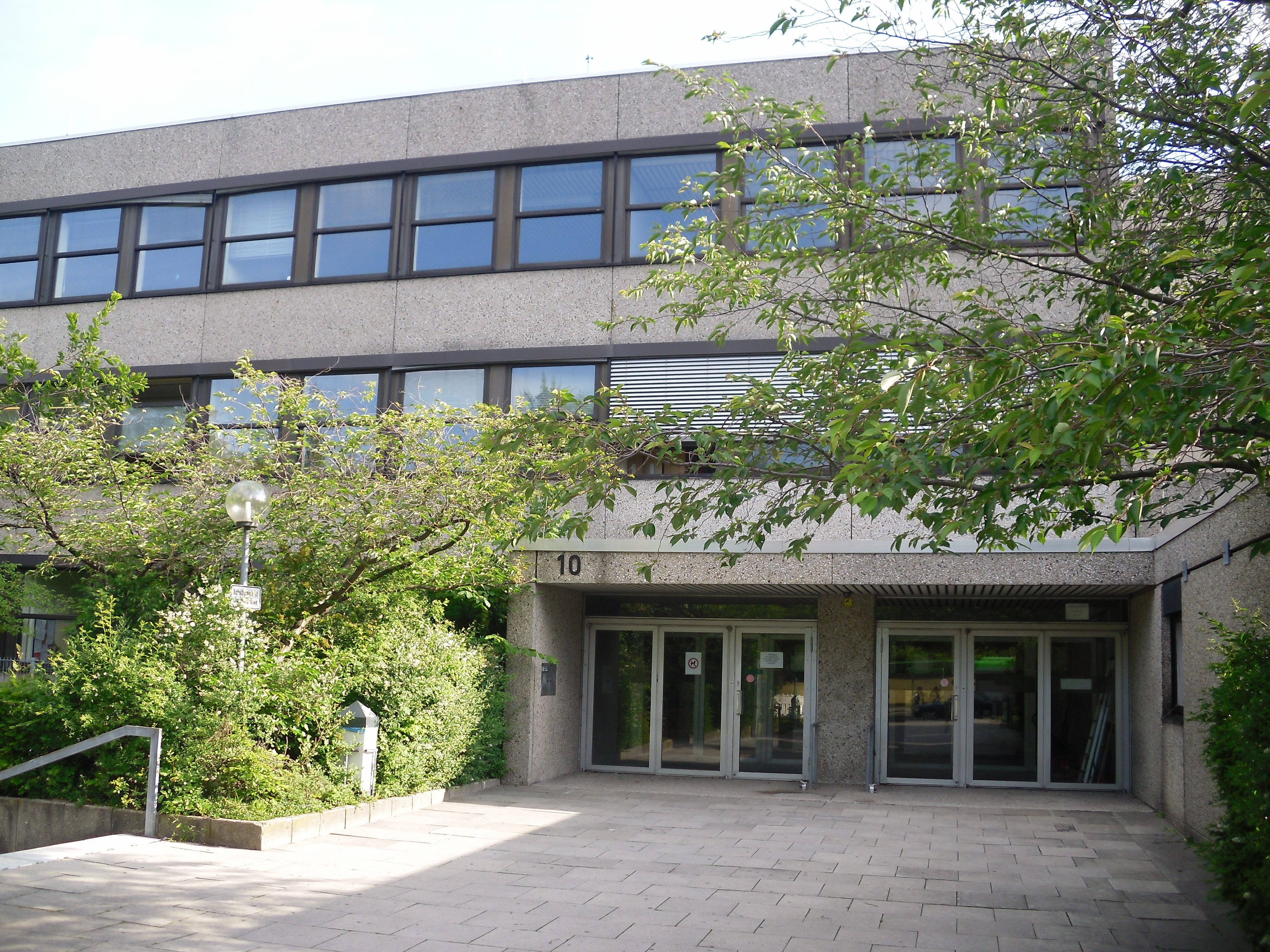 Haupteingang des Gebäudes der Alice-Salomon-Schule, Standort Herrenhausen